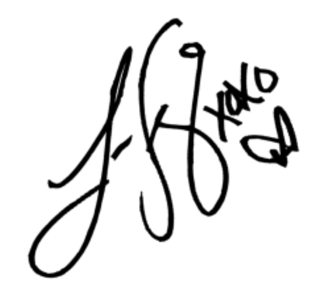 Autógrafo de la cantante Lauren Jauregui